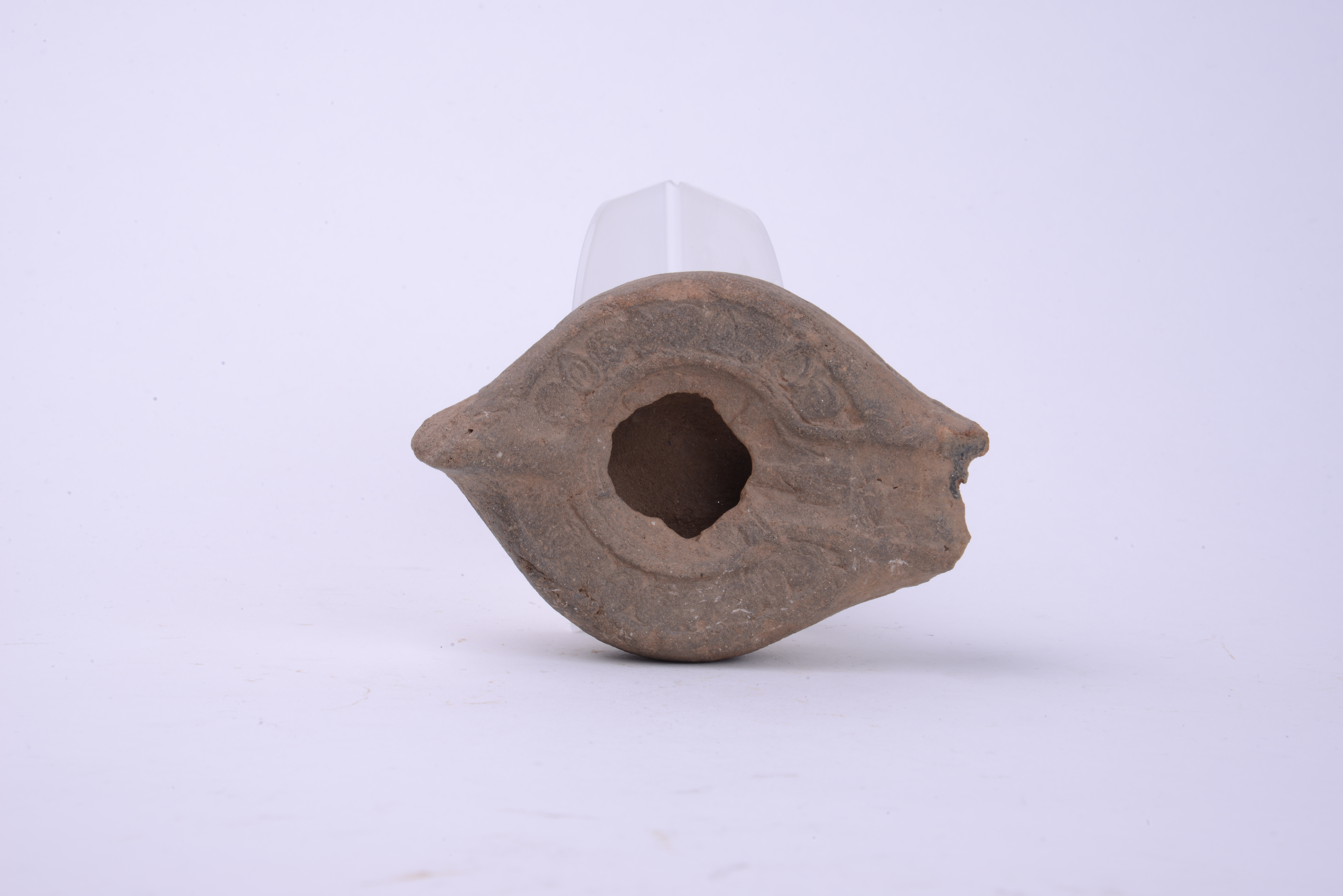 Srpski (latinica): Lampa od keramike iz perioda 6-og veka. Pronađena je arheološkim iskopavanjima iz 2000. godine na lokalitetu Kale, u Grdelici. Deo je Ranovizantijske zbirke Narodnog muzeja u Leskovcu.